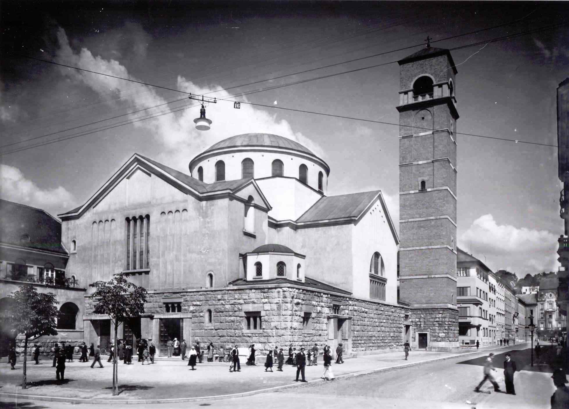 Viktor Kovačić- Crkva sv. Blaža, Prilaz gjure Deželića- Primorska ulica, Zagreb 1910. - 1913.